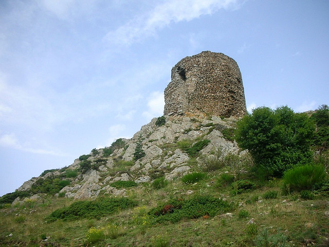 torre de Vetera (Batère en francès)